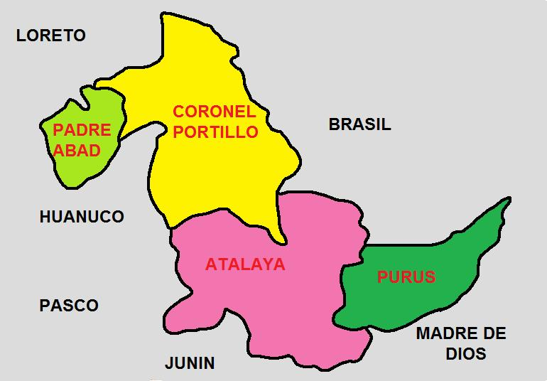 Division Politica del Departamento de Tumbes, una de las 25 circunscripciones en que se divide el Perú